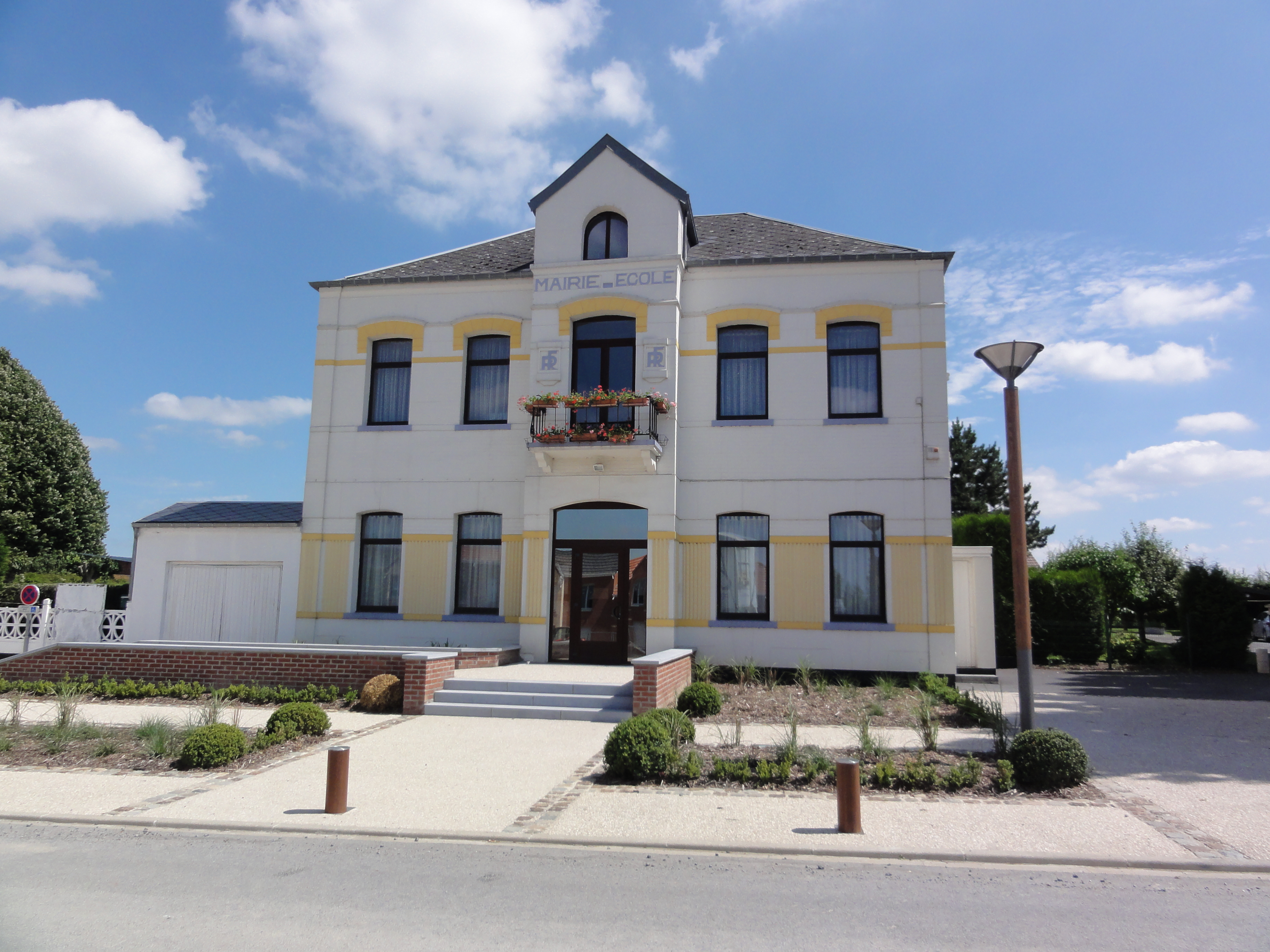 Bettignies (Nord, Fr) mairie-école